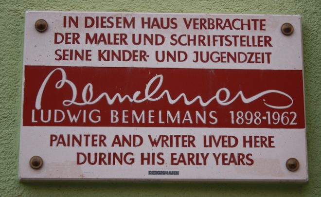 Schild am Bemelmans-Wohnhaus in Regensburg, das heute an Bemelmans erinnert